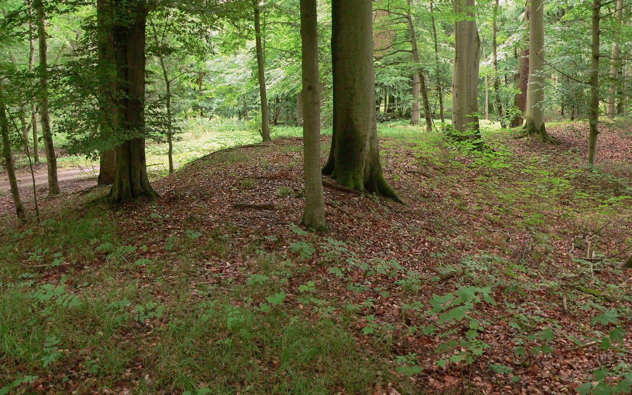 Burgwall im Elbholz